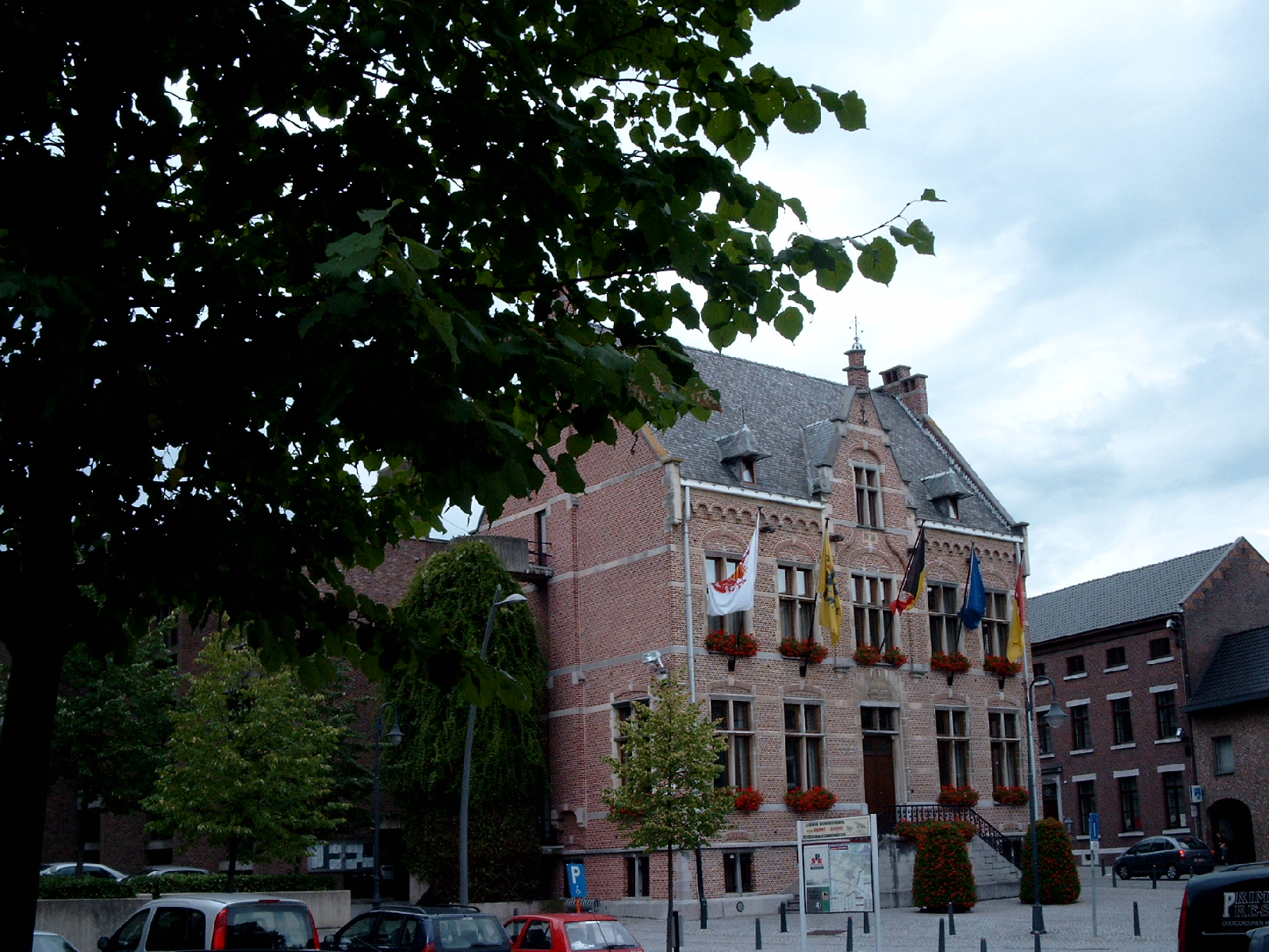 Gemeentehuis Diepenbeek, 1914, neogotiek